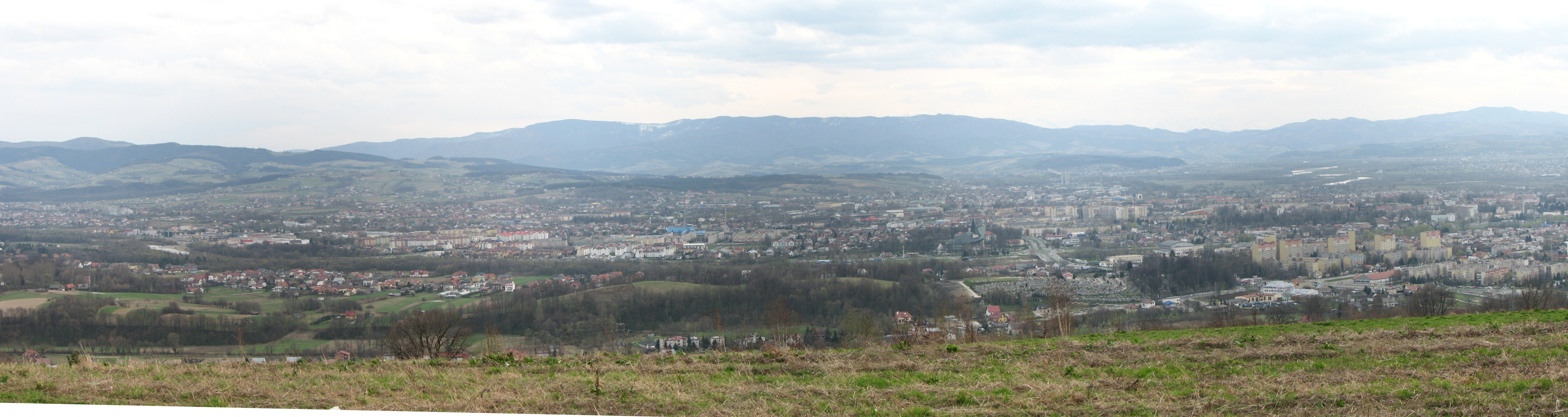 Szczyt Mużeń na Pogórzu Rożnowskim. Widok na Nowy Sącz.